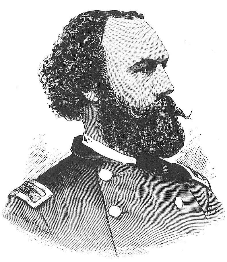 Jesse Gove (1824-1862)